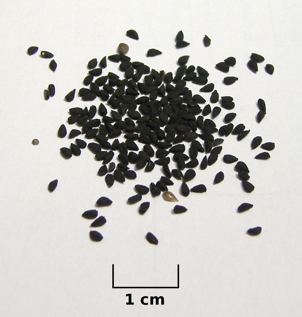 Samen des Schwarzkümmels